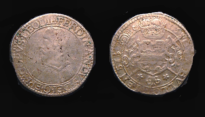 Monnaie d'argent de Ferdinand de Bavière. Au revrs l'écu de Bouillon. Chestret 587.